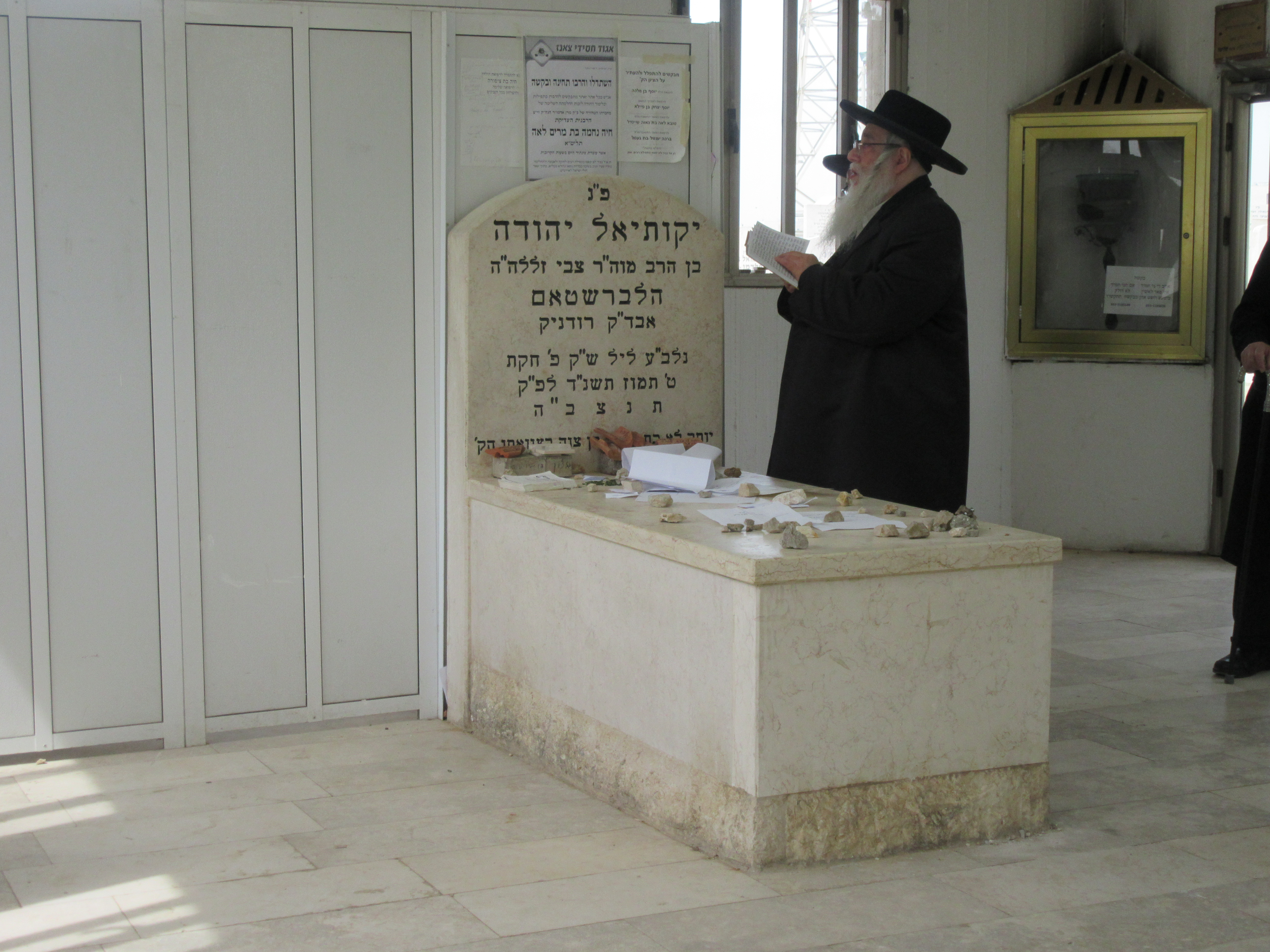 האדמור מצאנז, רבי צבי אלימלך הלברשטם, על קבר אביו בעל השפע חיים זי"ע בנתניה